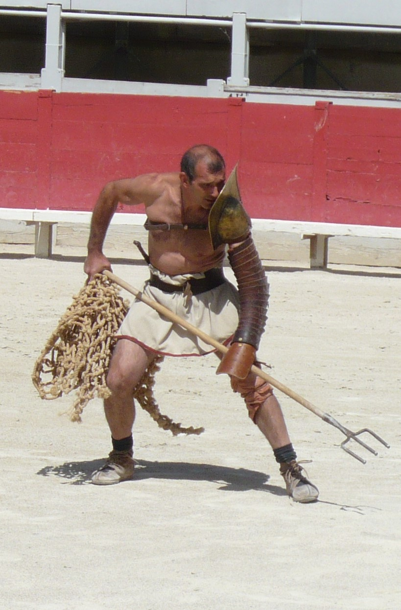 ACTA Combats historiques Rétiaire équipé de son trident, filet, poignard et épaulière